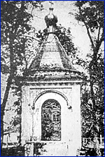 Saint Paraskevi chapel in Lutsk